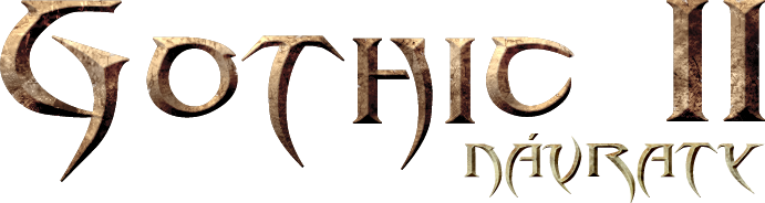 České logo neoficiálního datadisku pro Gothic II - Návraty